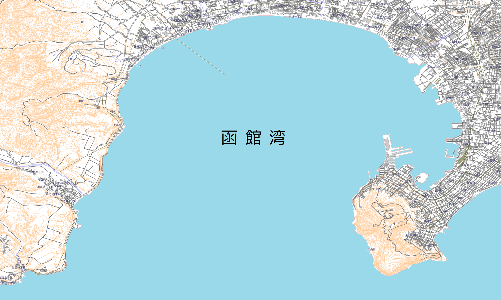 北海道函館湾地図